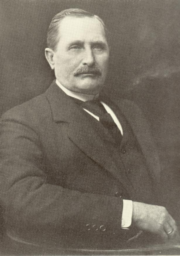 Robert Andersen ca. 1906